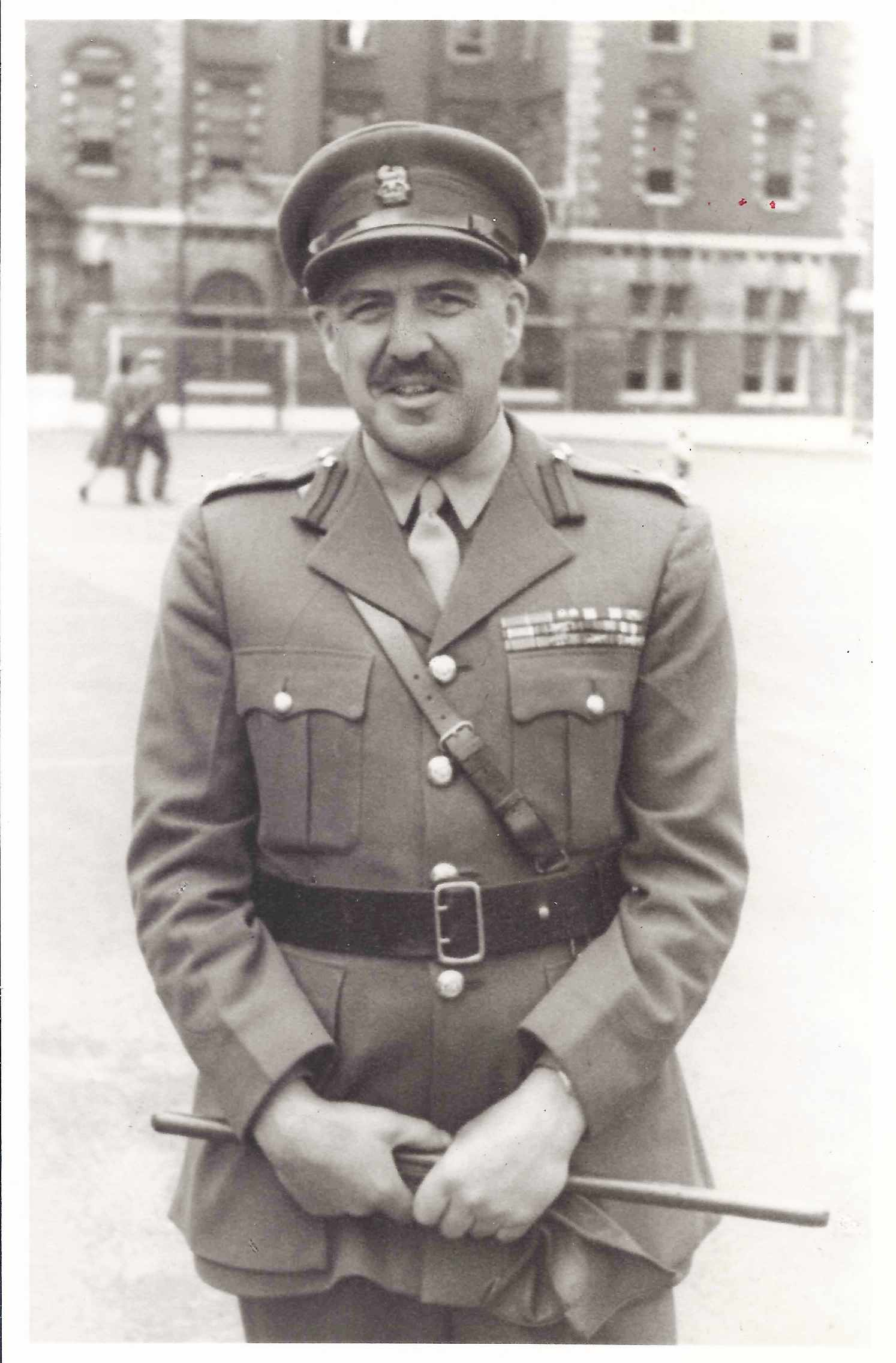 jamesalexanderdeansjohnston